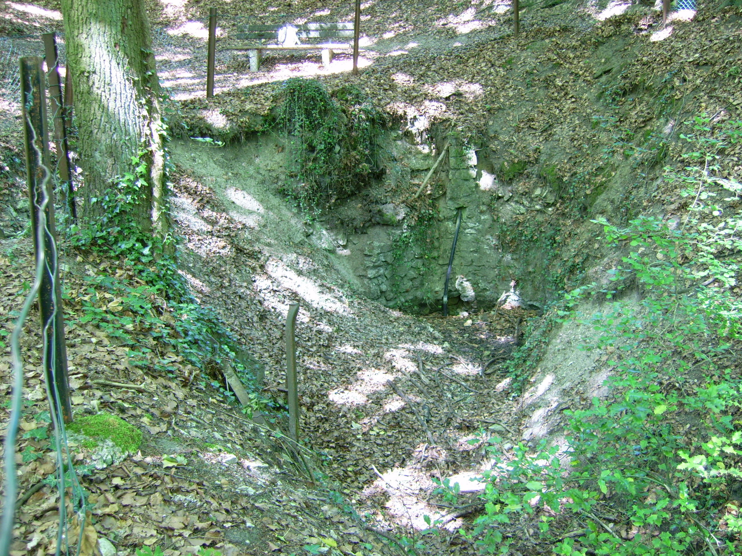 Felsenquelle bei Lienen-Höste